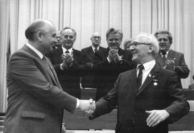 ADN-ZB-Mittelstädt 21.4.86-B-Berlin: XI. SED-Parteitag Erich Honecker, Generalsekretär des ZK der SED und Vorsitzender des Staatsrates, nimmt nach seiner Schlußansprache den herzlichen Glückwunsch Michail Gorbatschows, des Generalsekretärs des ZK der KPdSU, entgegen.